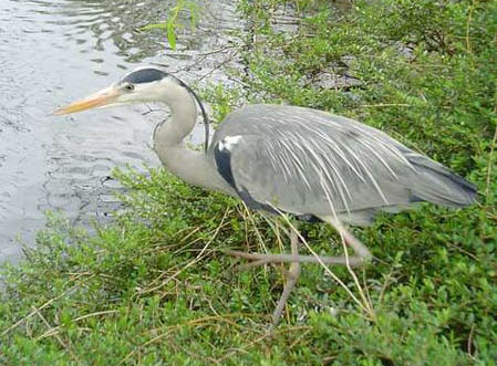 Foto van een Ardea cinerea blauwe reiger bij een vijver in Artis. Foto Xaphire Categorie:Wikipedia:Afbeeldingen met GNU/GFDL Licentie Categorie:Afbeelding vogel 15 dec 2004 22:27 Xaphire 480x640 (70847 bytes) (Foto van een :nl:blauwe reiger bij een vijver in :nl:Artis . Foto :nl:Xaphire )